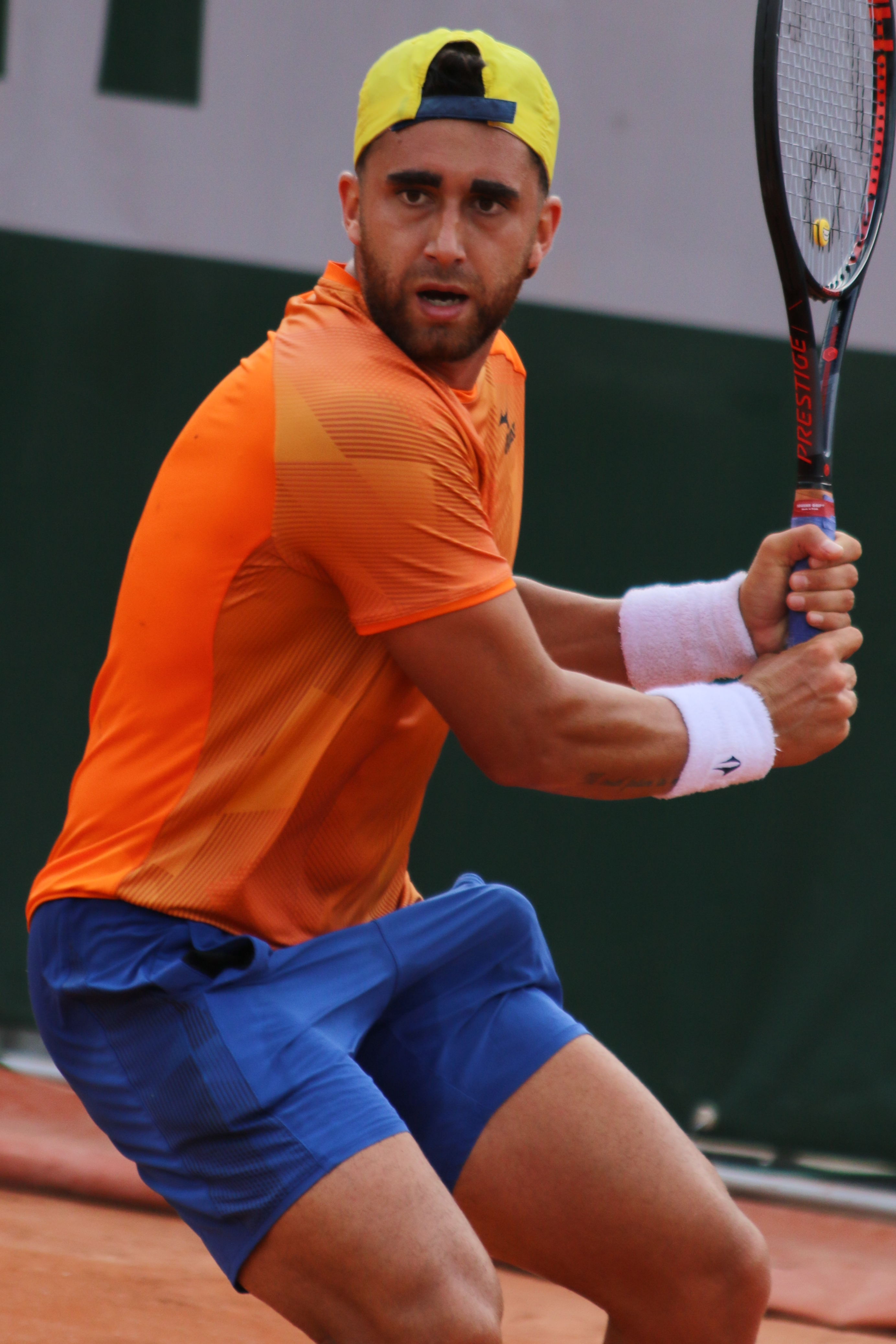 Arguello RGQ19 (10)